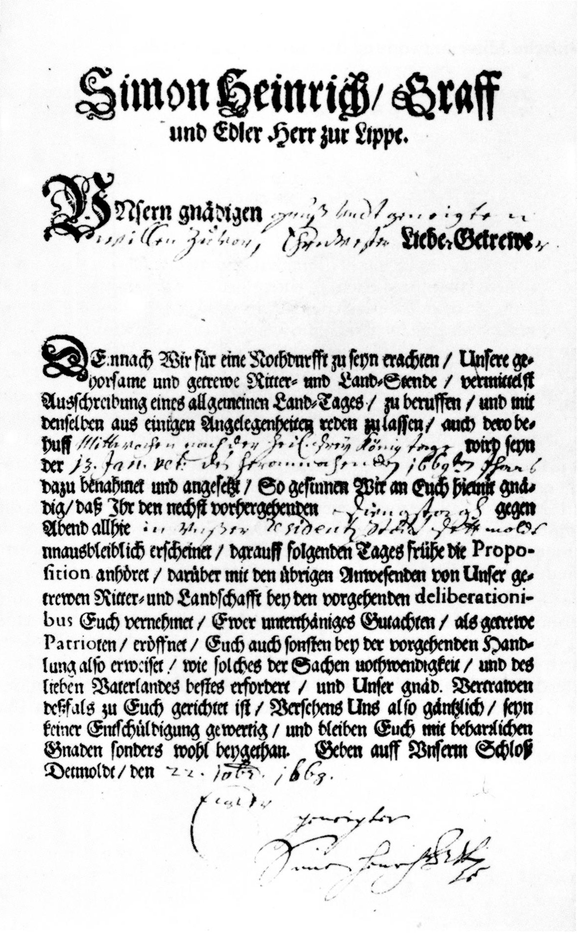 Dendeschreiben zur Einberufung des Lippischen Landtags